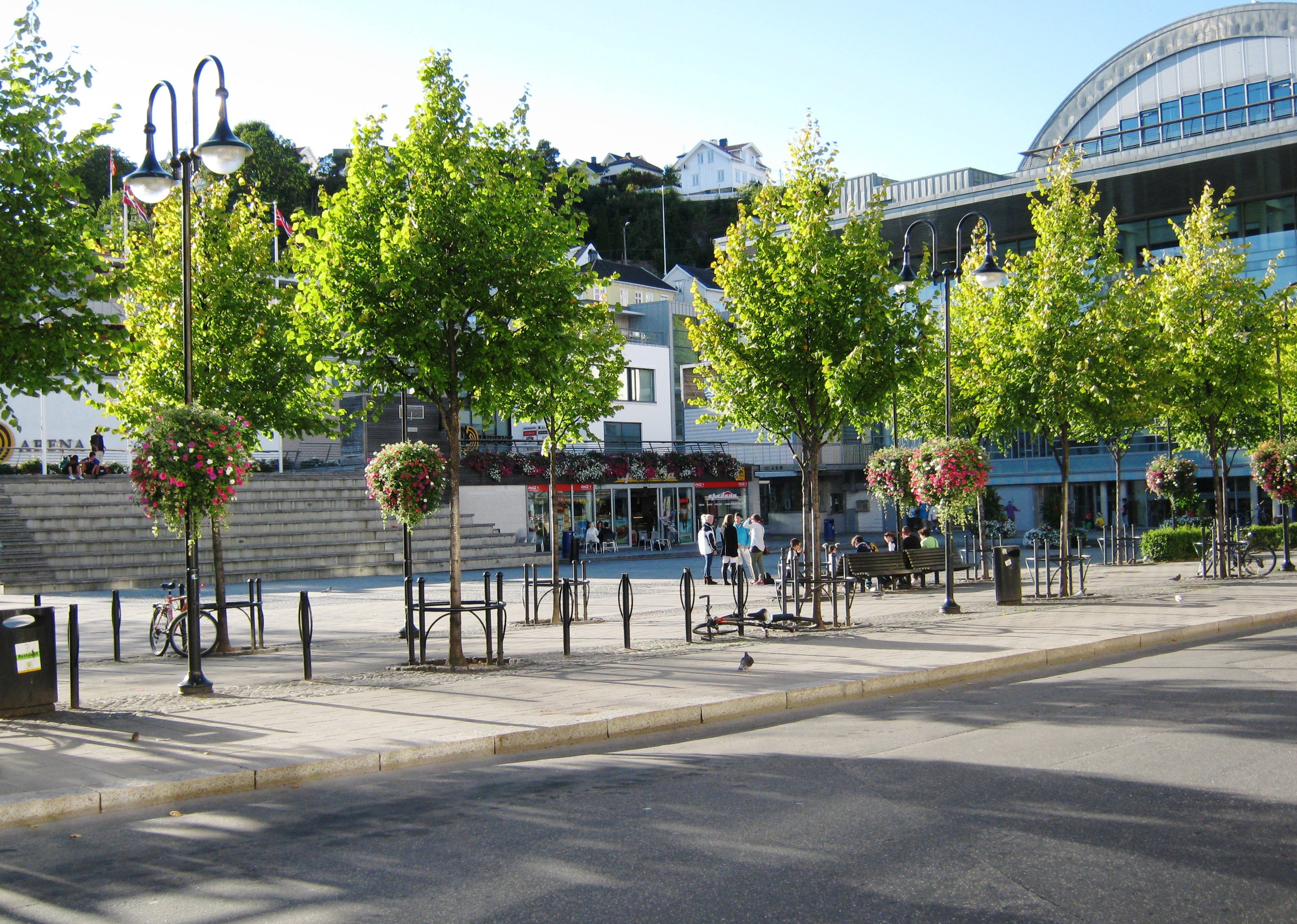 Sam Eydes plass i Arendal